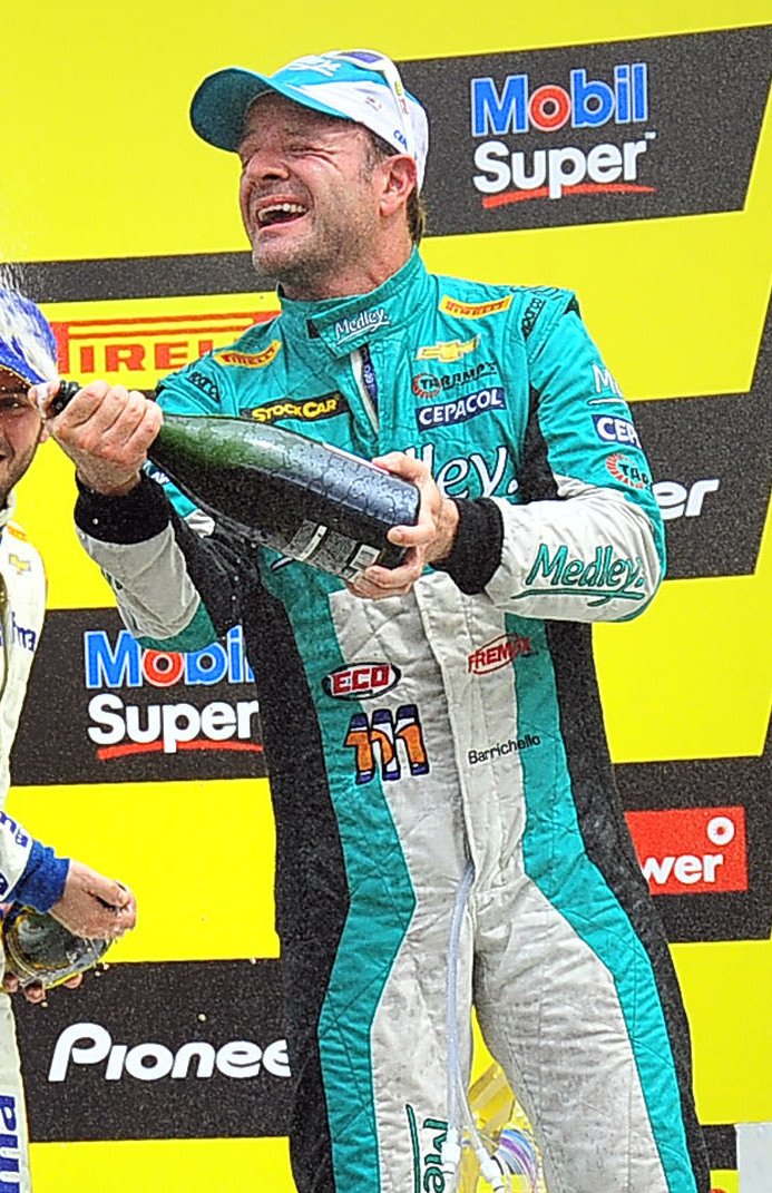 Etapa de Salvador da Stock Car Brasil na temporada de 2013.